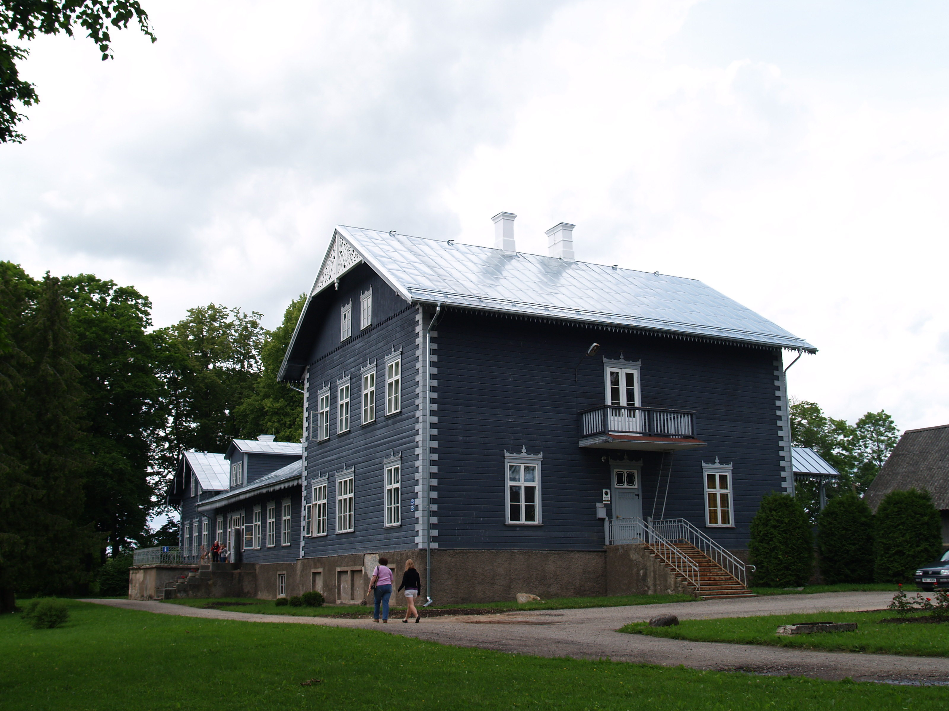 Pärsti mõisa peahoone (19. sajand).